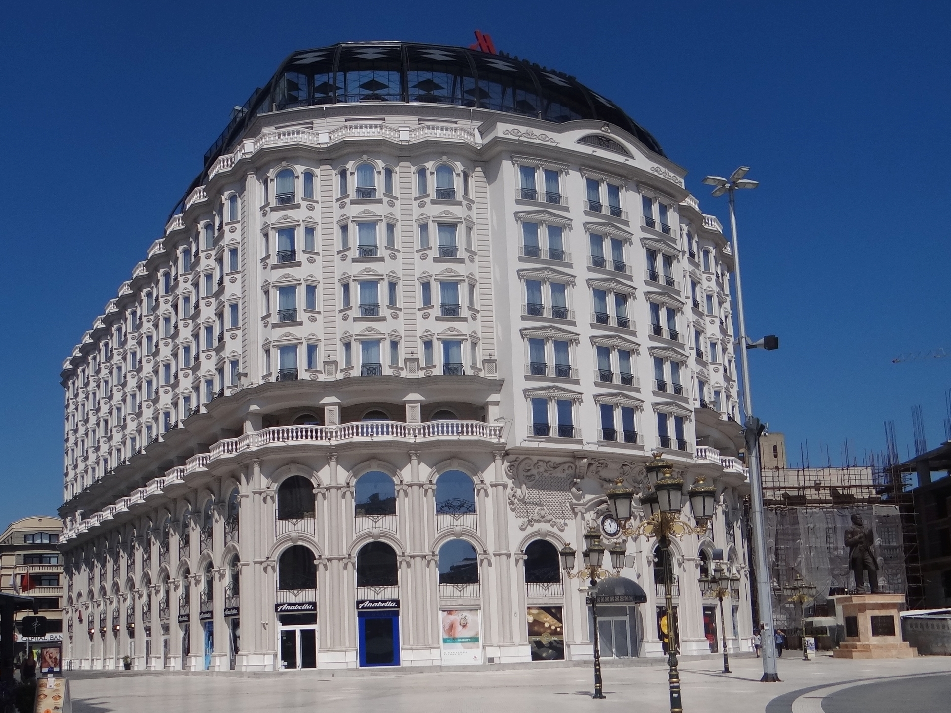 Skopje